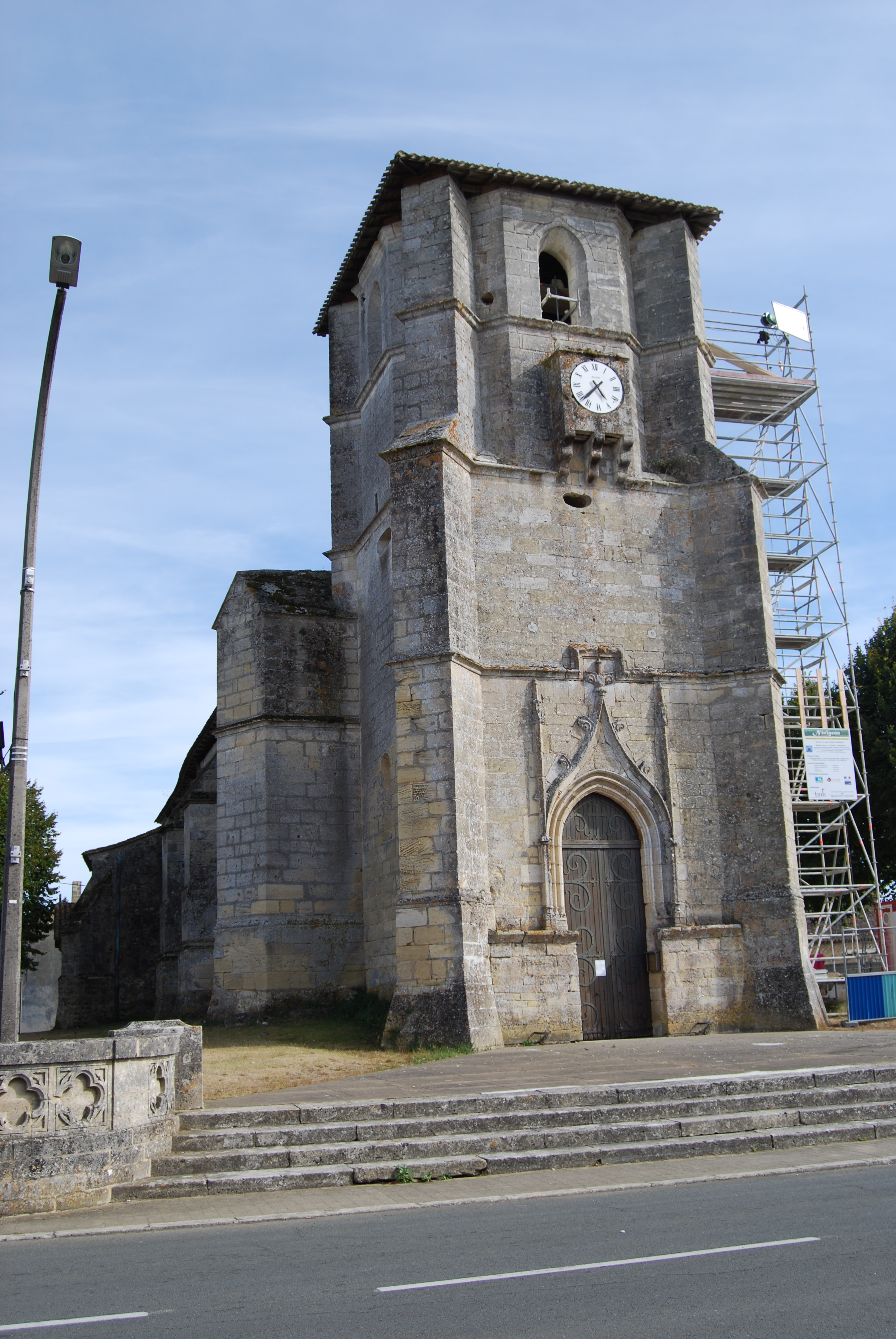 Église Saint-Martin de Nérigean, (Inscrit, 1926) .